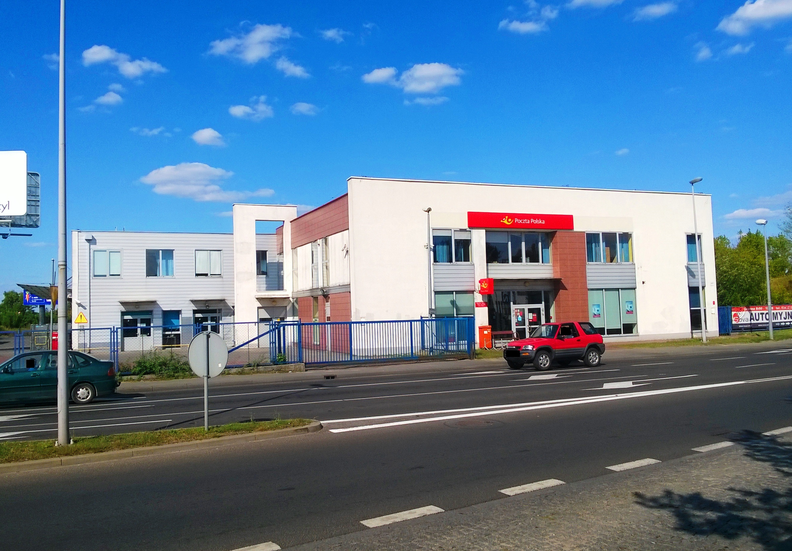 Urząd Pocztowy Toruń 2